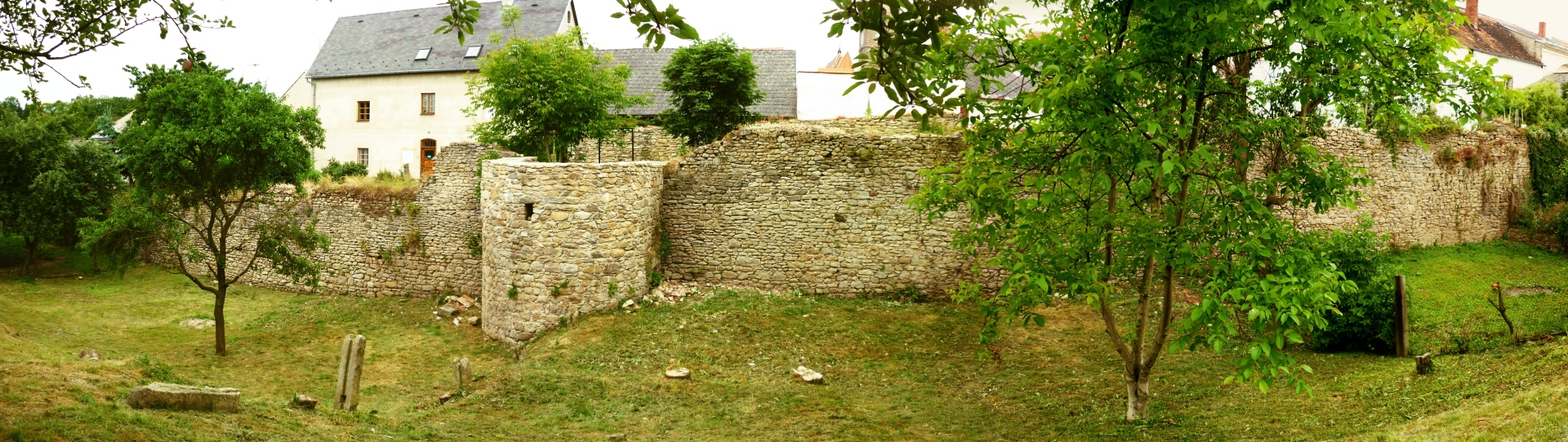 Zbytky slavonického opevnění na východní straně.